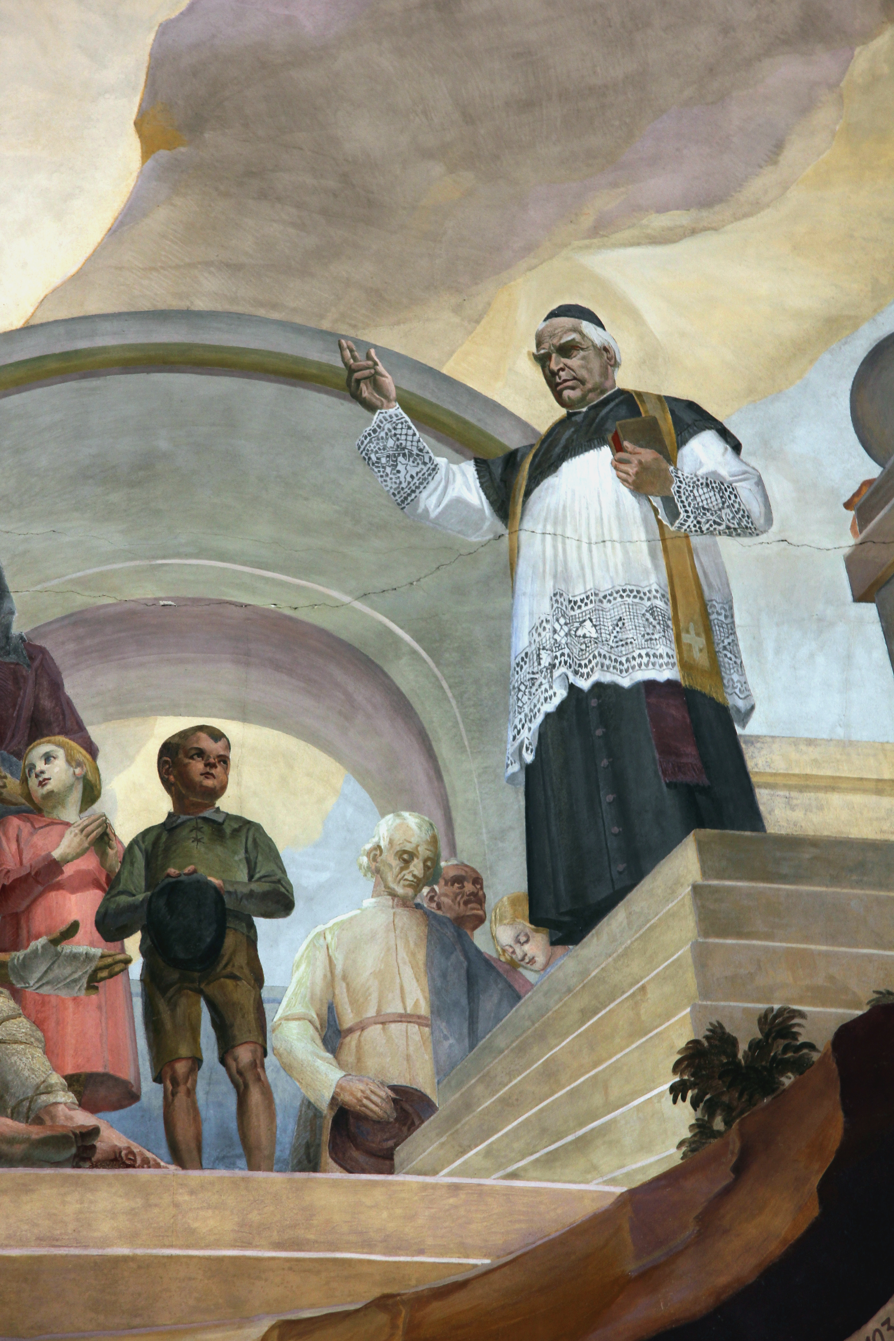 Stadtpfarrkirche St. Justina, Bad Wörishofen. Deckengemälde (Ausschnitt), 1936 von Johann Michael Schmitt (* 1878, † 10. März 1943) im Westteil der Kirche: Pfarrer Sebastian Kneipp predigt Kranken und Gesunden. Kneipp war von 1881 bis 1897 Pfarrer in St. Justina.